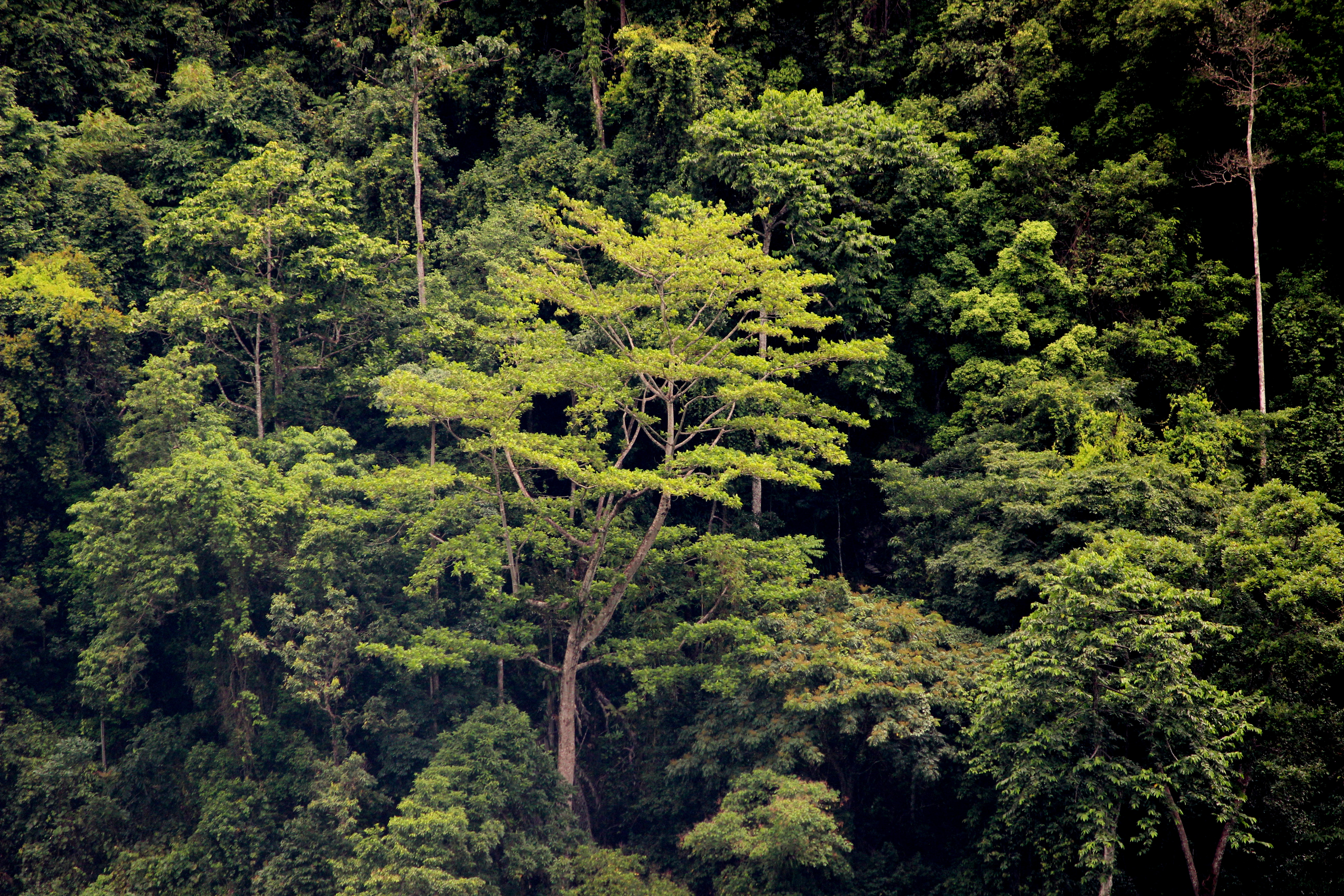 hutan lindung olas, salah satu dara respan air yg berada di pulau seram